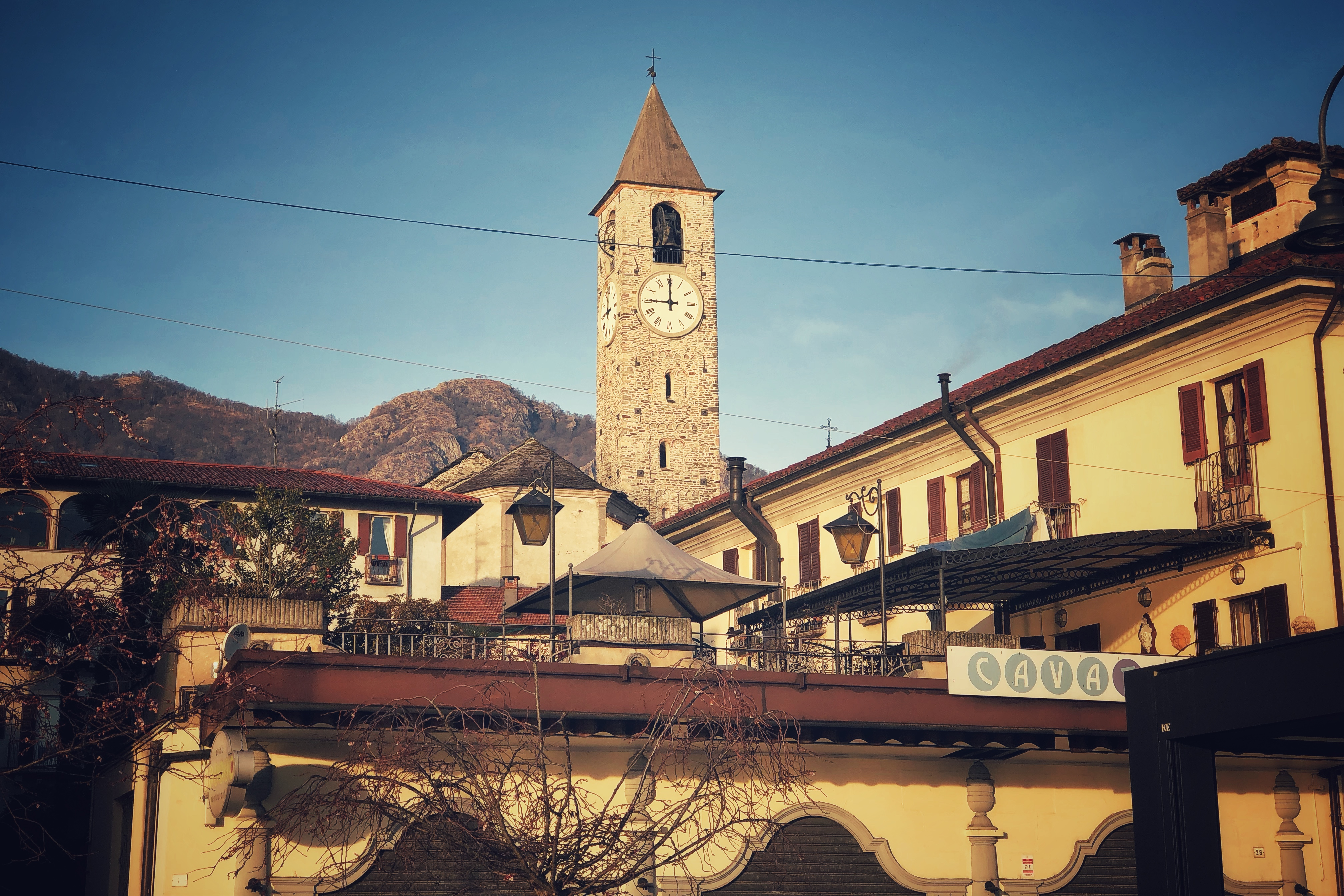 Chiesa dei Santi Gervaso e Protaso in Baveno